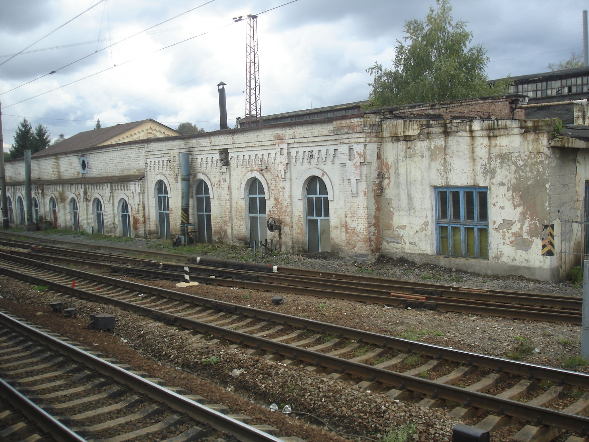 Одно из старых зданий на территории ЖД-станции Ртищево